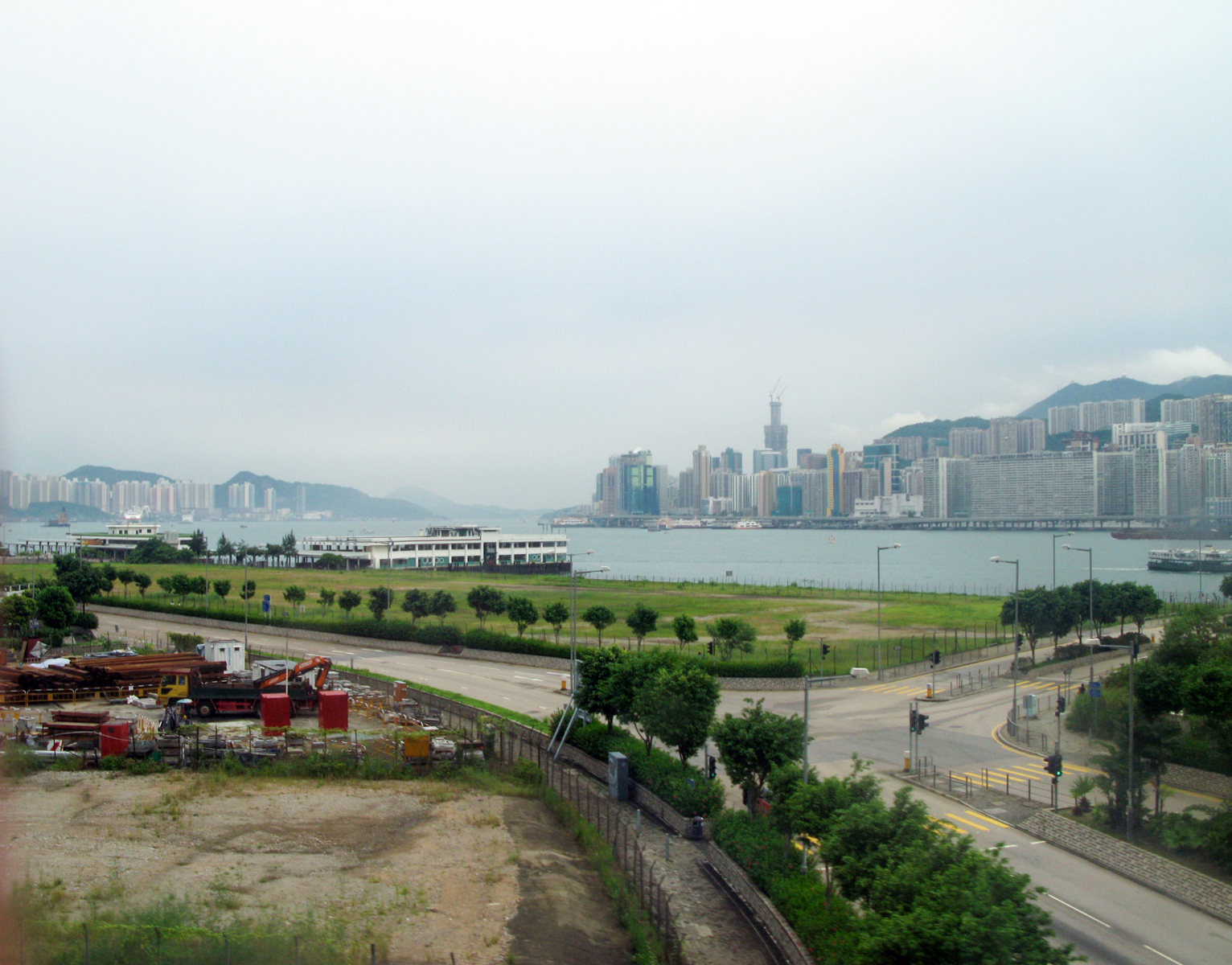 Hung Hom Bay